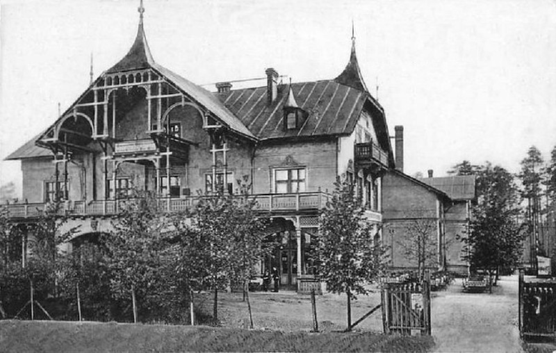 Restauracja "Leśny Zamek" z salą koncertową zbudowana w 1877 roku w Katowicach Ligocie. W 2 poł. XX wieku przebudowana na cele mieszkalne i pozbawiona cech stylowych. Fotografia z początku XX wieku.